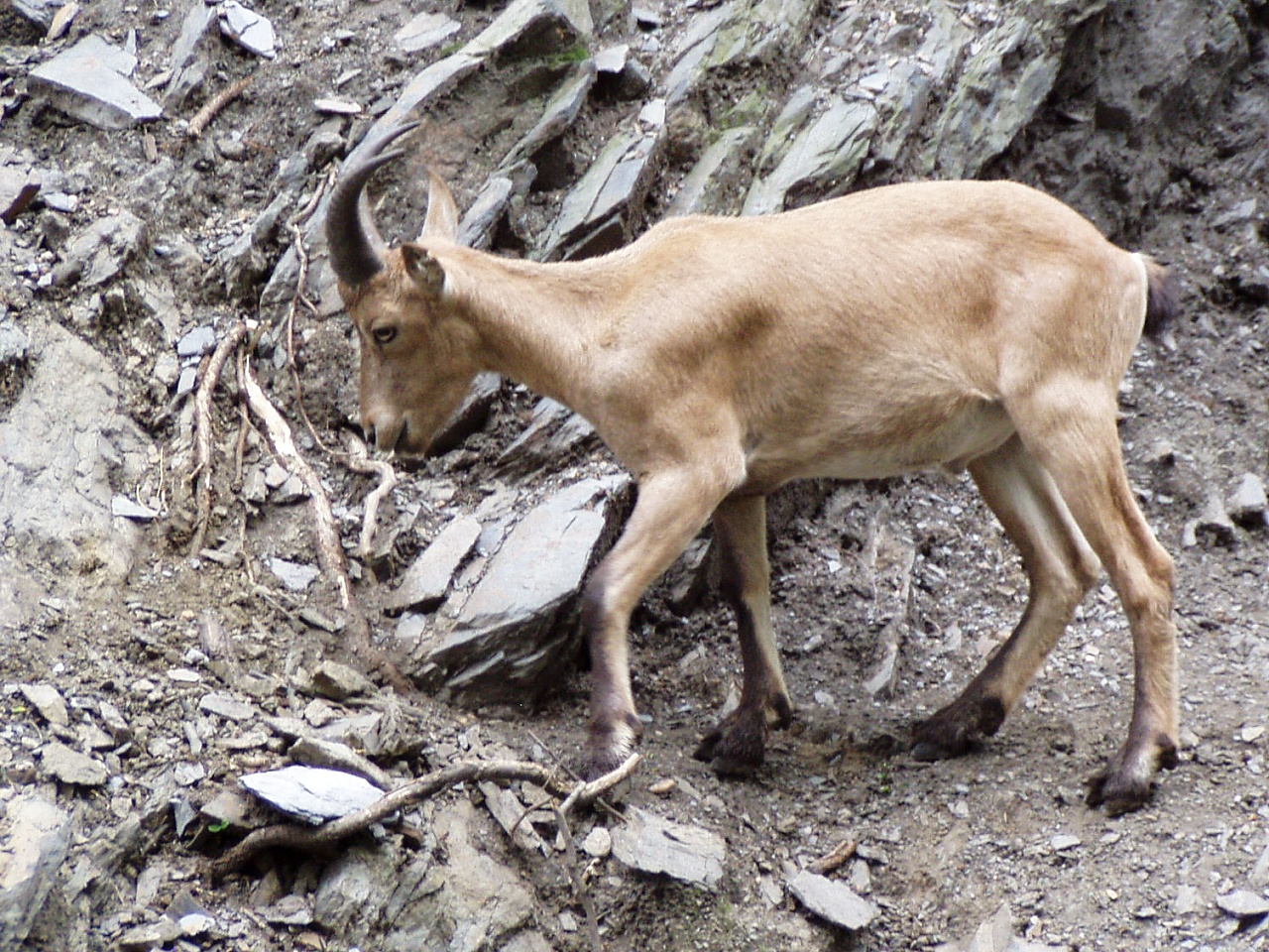 Capra caucasica (Prague Zoo)